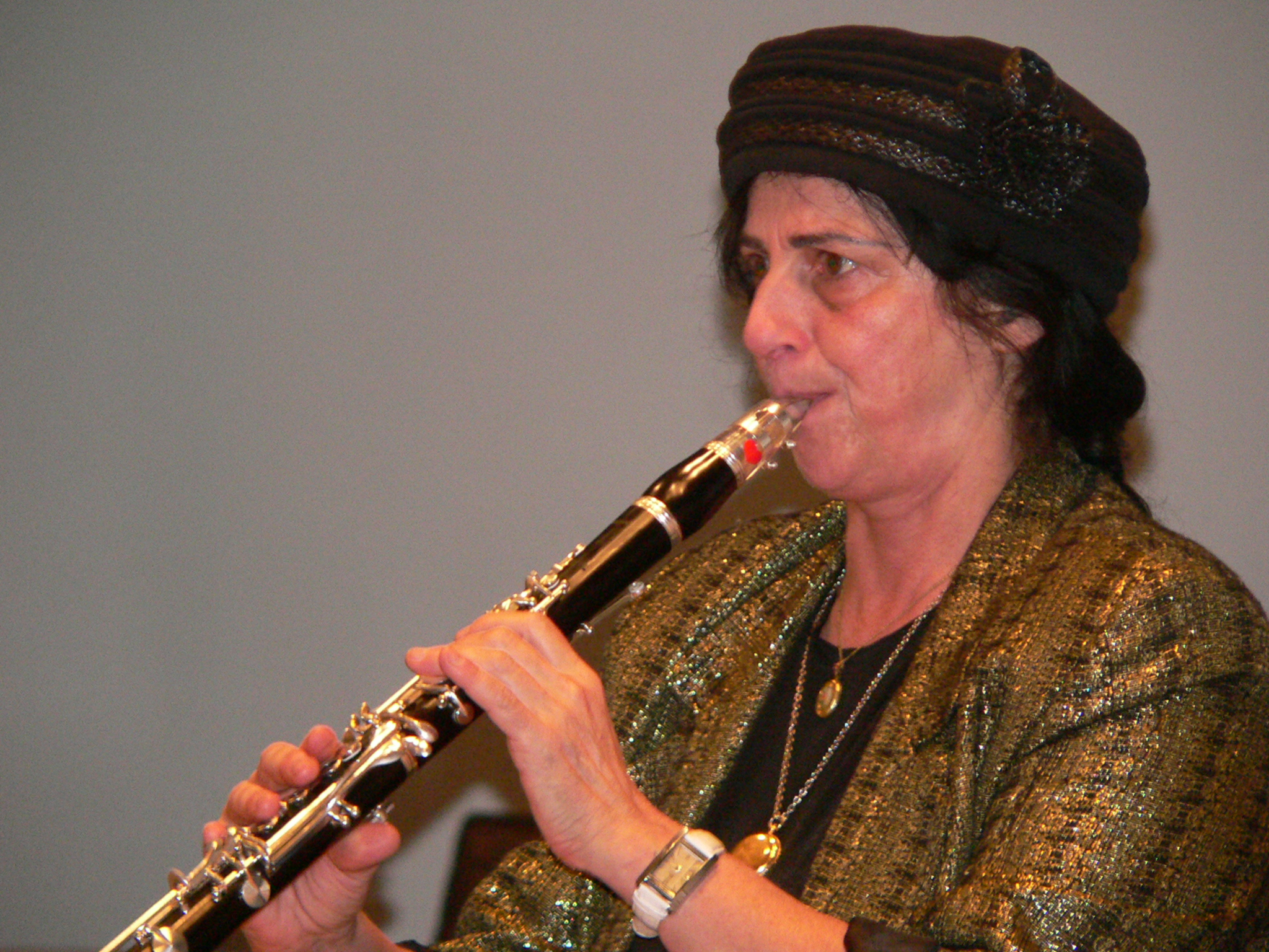 Irith Gabriely beim Holocaust-Gedenkkonzert in Rodgau